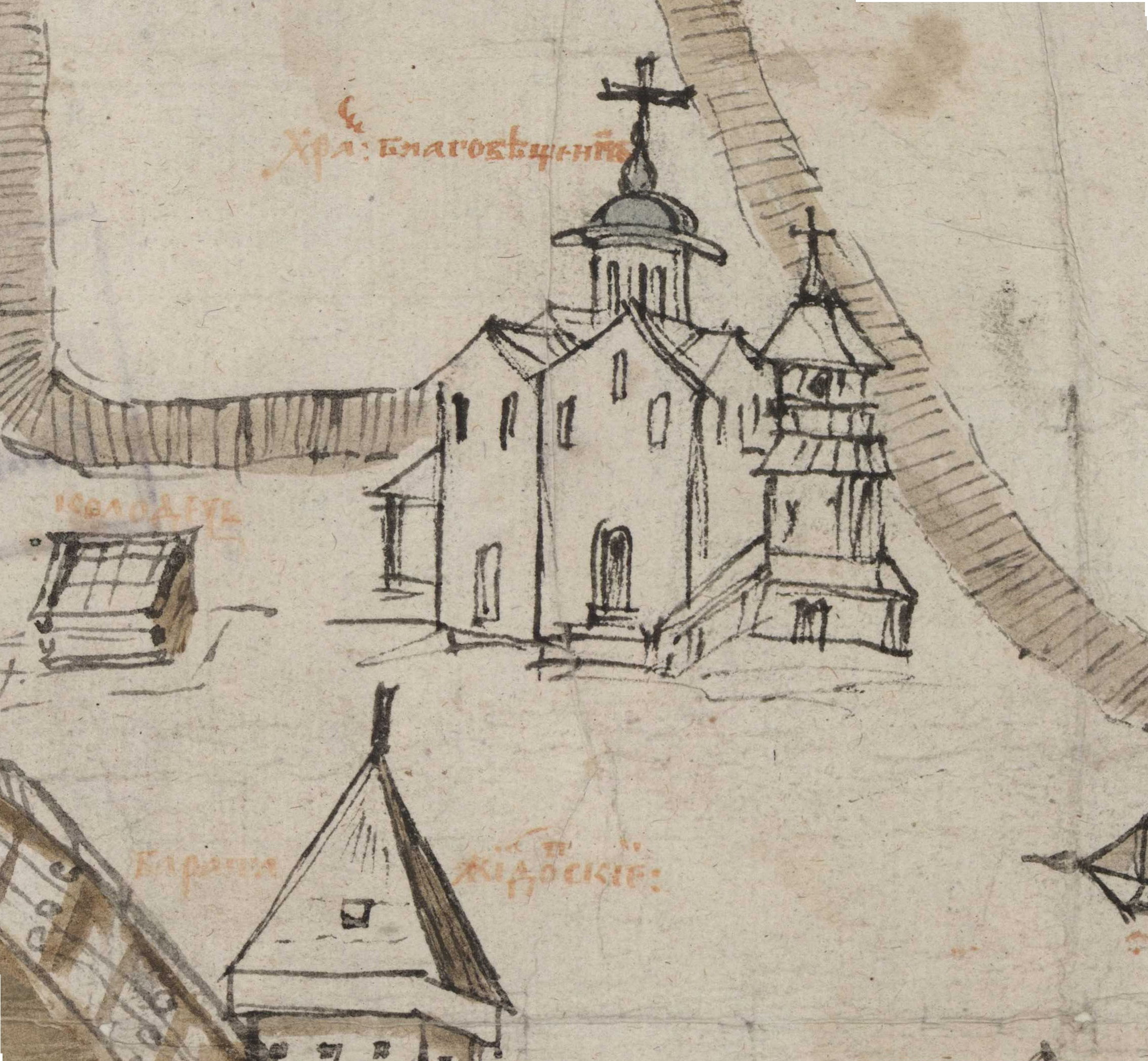 Беларуская (тарашкевіца): Віцебск. Царква Зьвеставаньня Багародзіцы